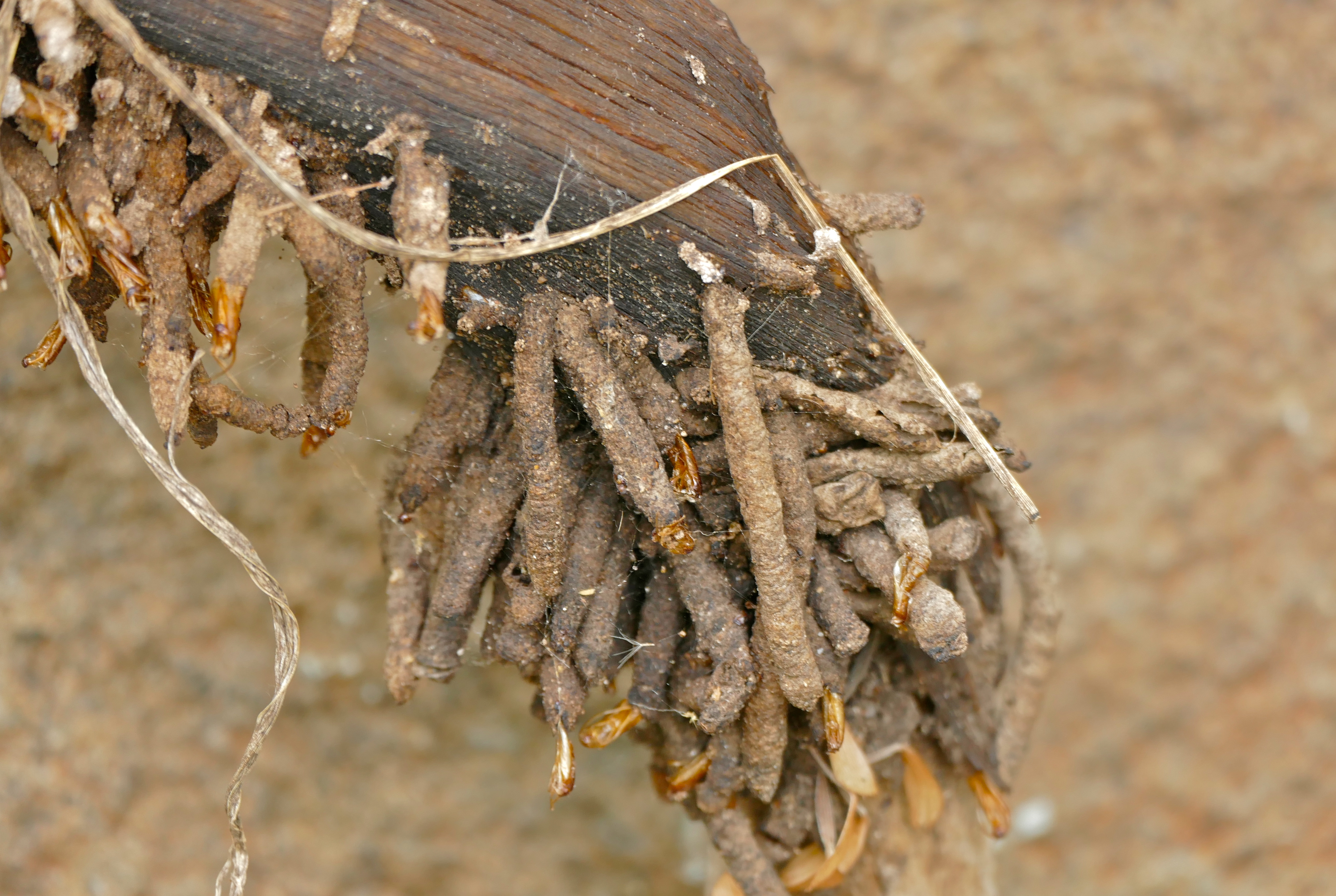 Orpen Camp, Kruger NP, SOUTH AFRICA